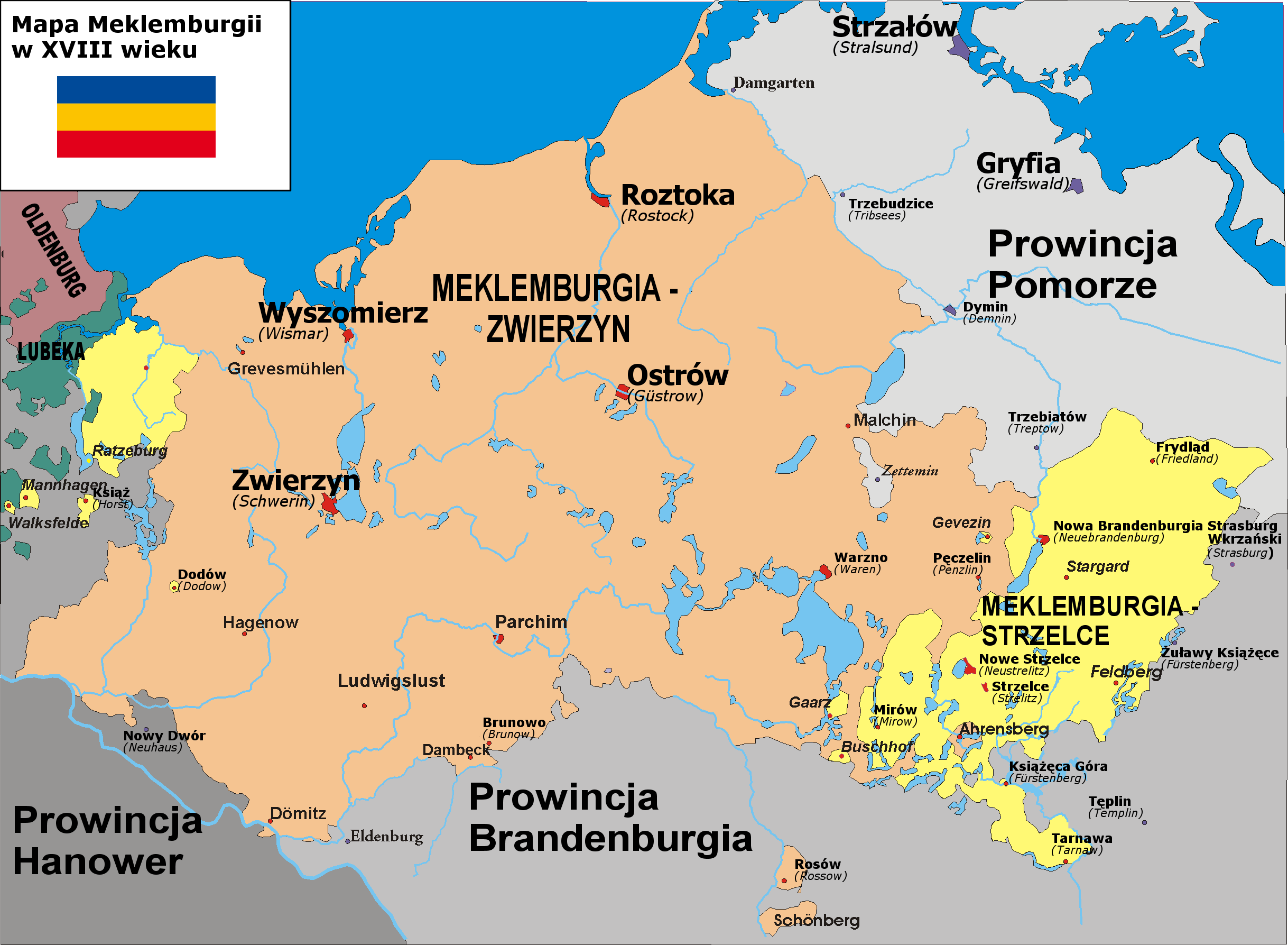 Mapa przedstawiająca obydwa Księstwa Meklemburgii w XVIIIw.